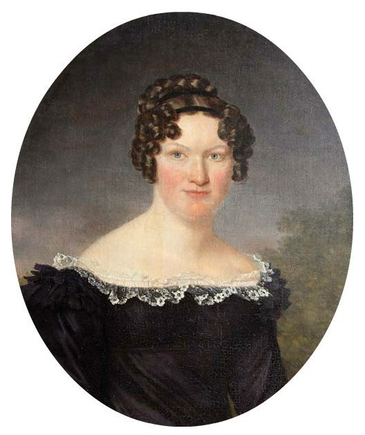 Мария Васильевна де Бальмен (1791—1863), ур. Нарышкина, во втором браке за А. Д. Олсуфьевым.